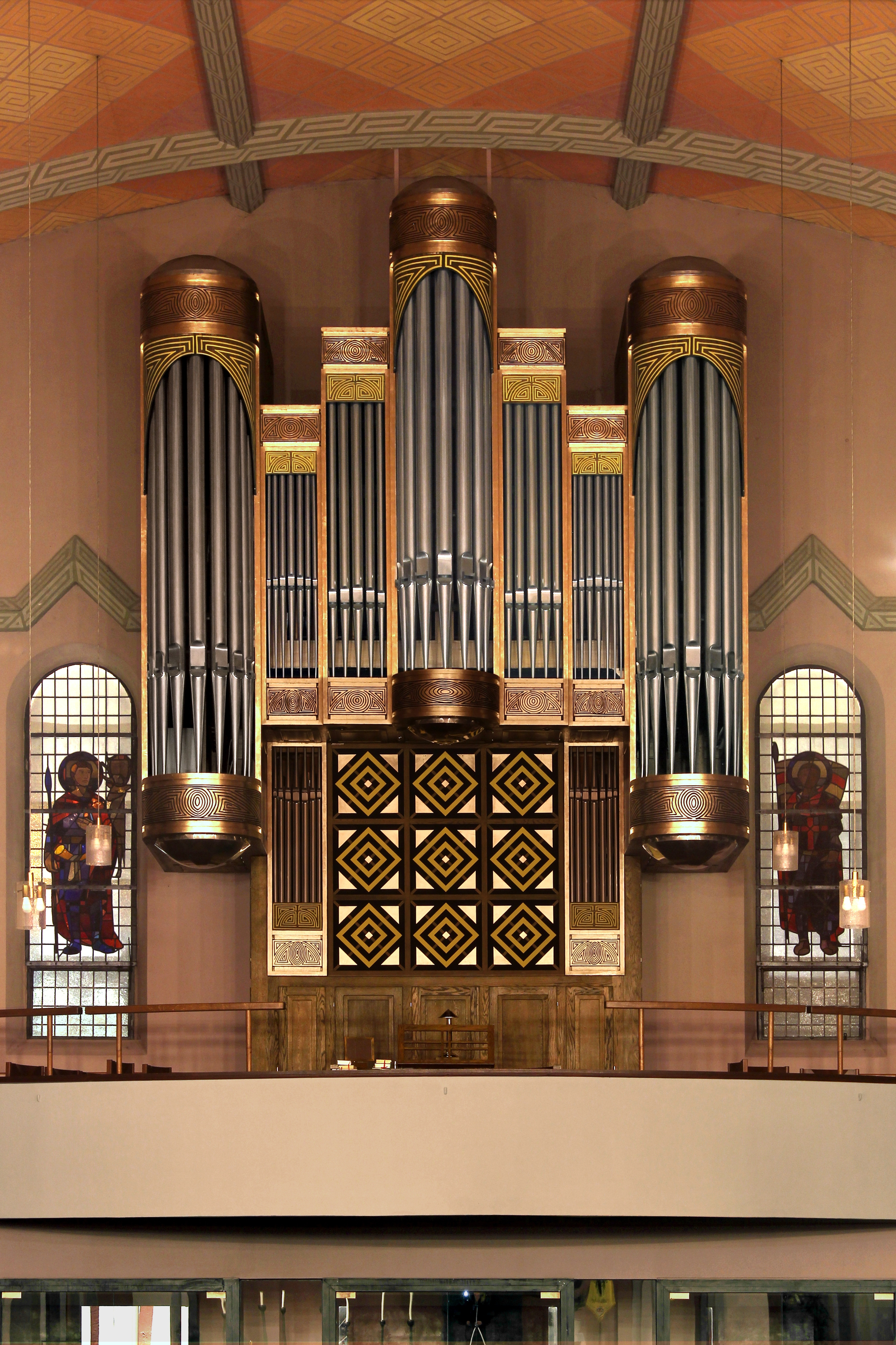 Orgel der Pfarrkirche St. Mauritius Kärlich, Hugo Mayer Orgelbau 1994